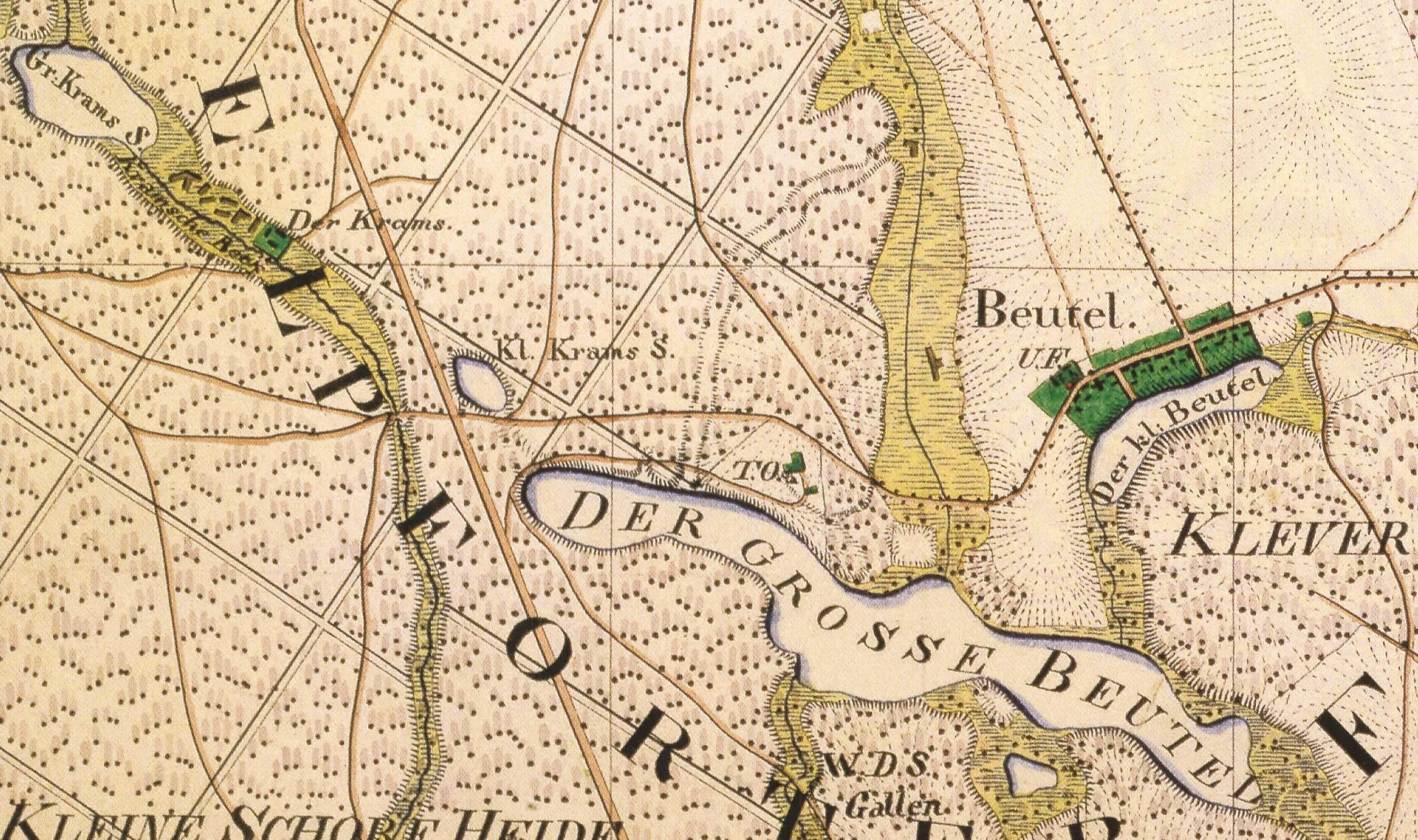 Beutel, Ortsteil der Stadt Templin, Landkreis Uckermark, Brandenburg, Ausschnitt aus dem Urmesstischblatt 2846 Gandenitz von 1825